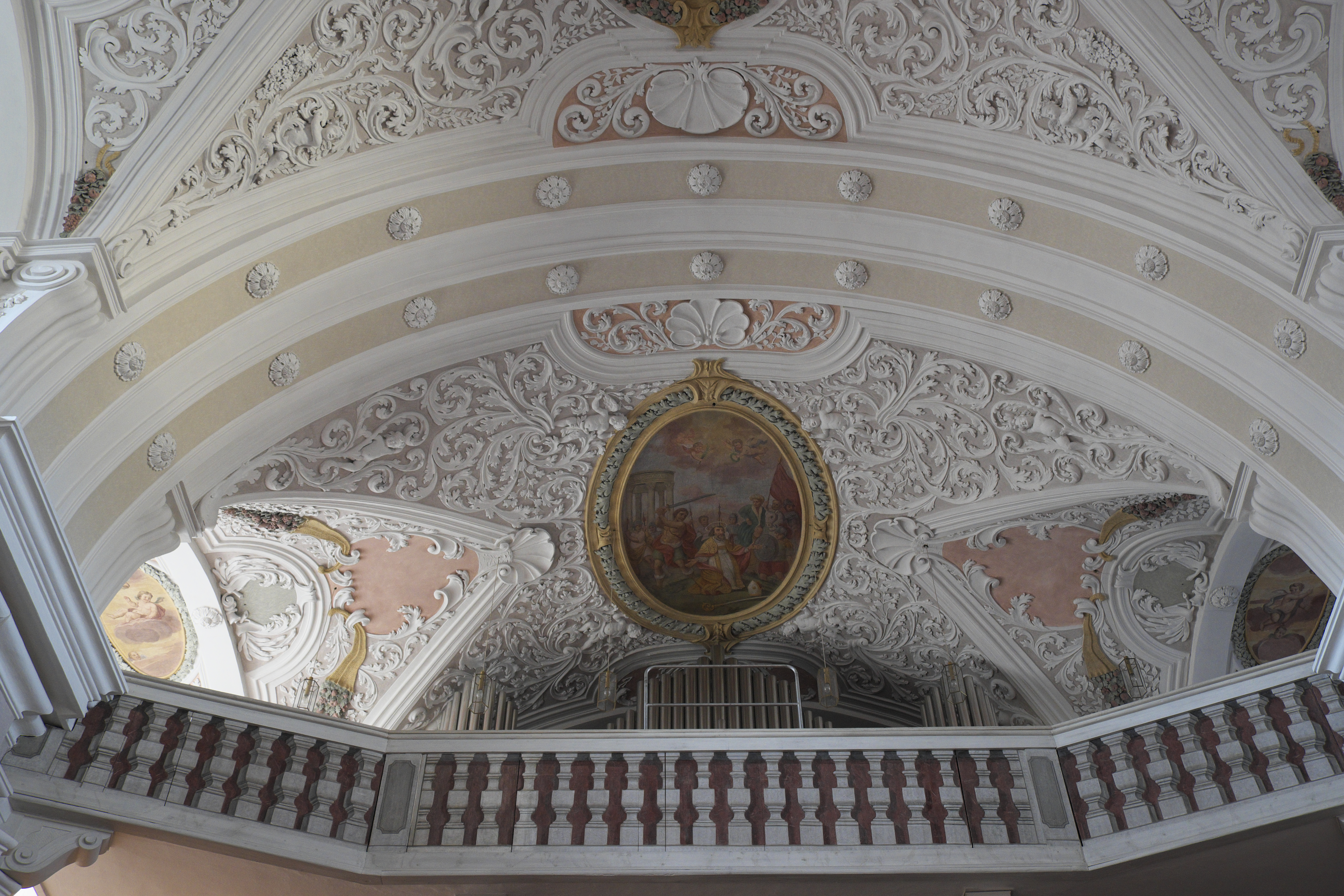 Katholische Pfarrkirche St. Martin in Waging am See im Landkreis Traunstein (Bayern/Deutschland), Stuck im Langhaus von Joseph Schmidt, von 1699; Fresko mit der Enthauptung des heiligen Maximilian von Celeia